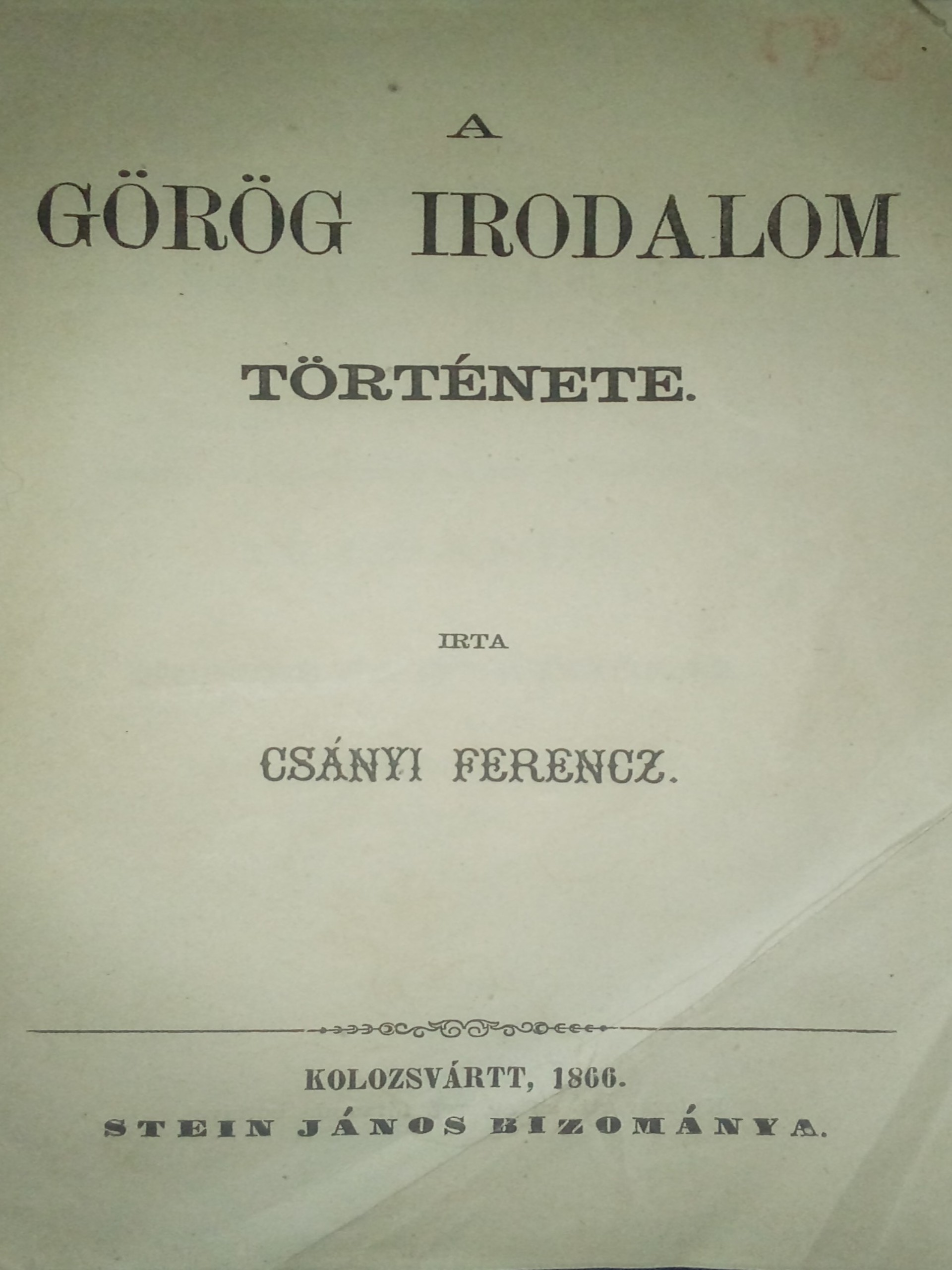 Az adott mű címlapja.